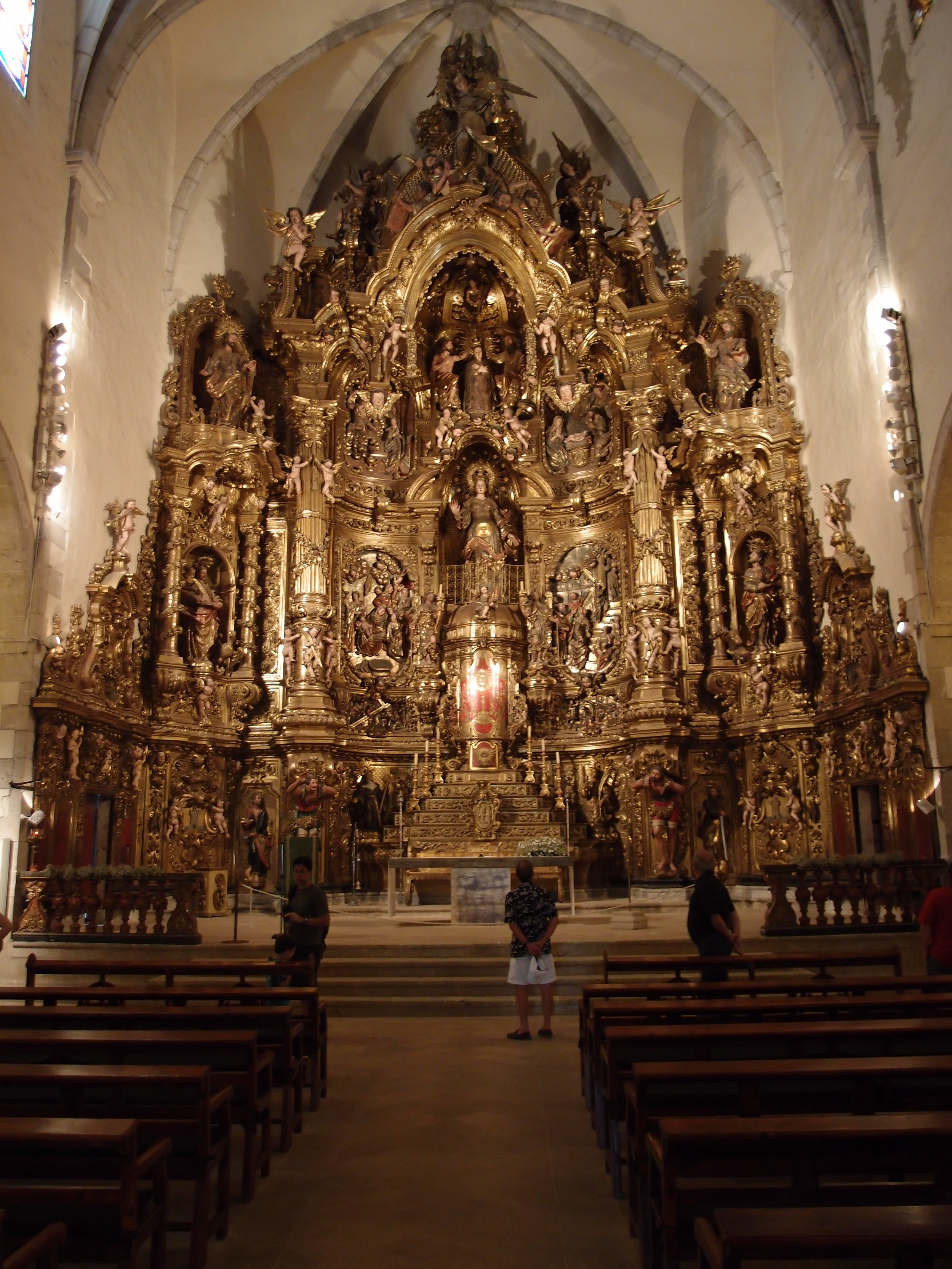 Die Església de Santa Maria de in Cadaqués (Hauptaltar) Datum: 05.09.2012 Urheber: M. Pfeiffer alias Benutzer:Gordito1869 Quelle: privates Fotoarchiv des Urhebers